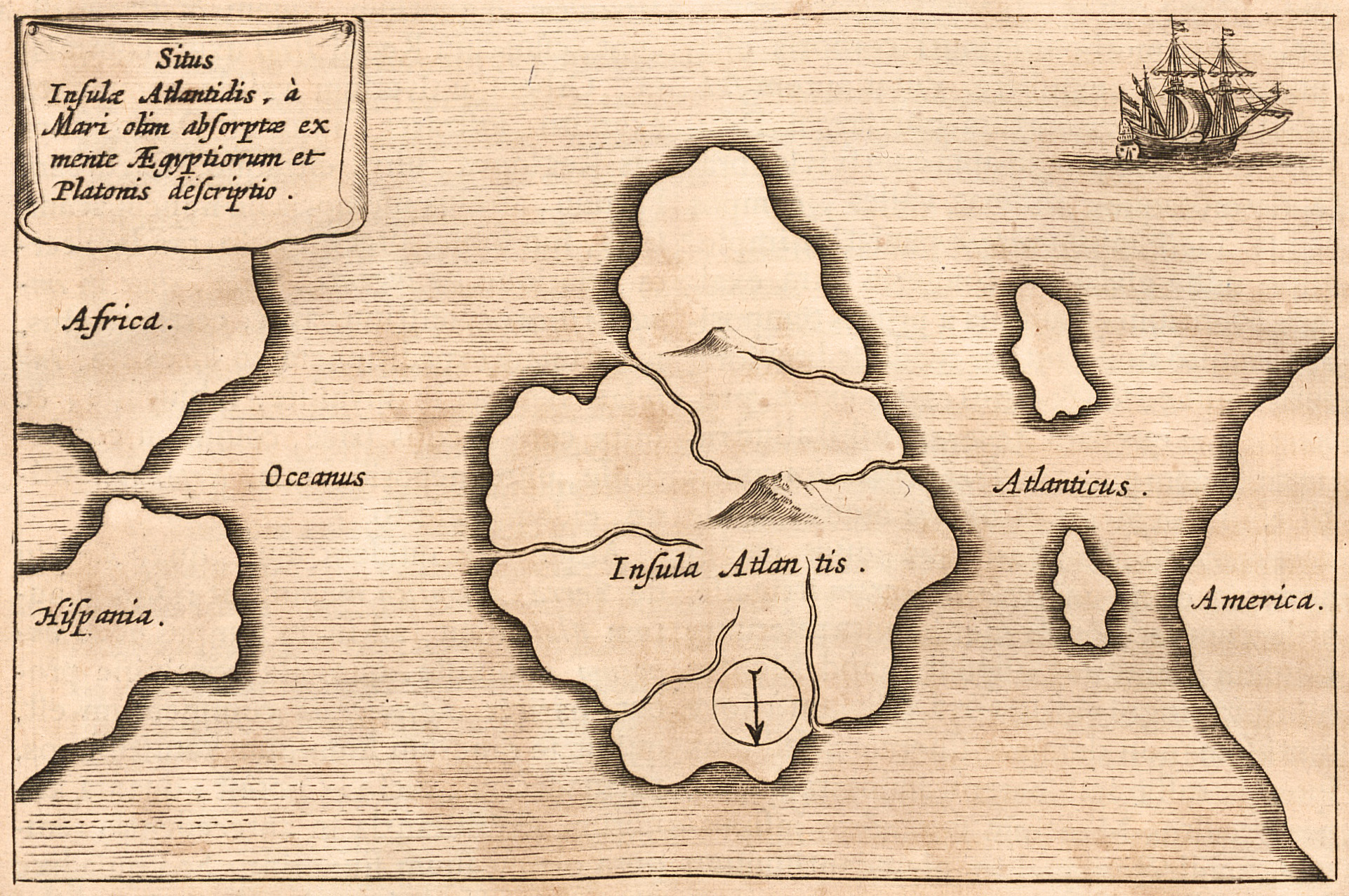 fiktive Karte mit Atlantis